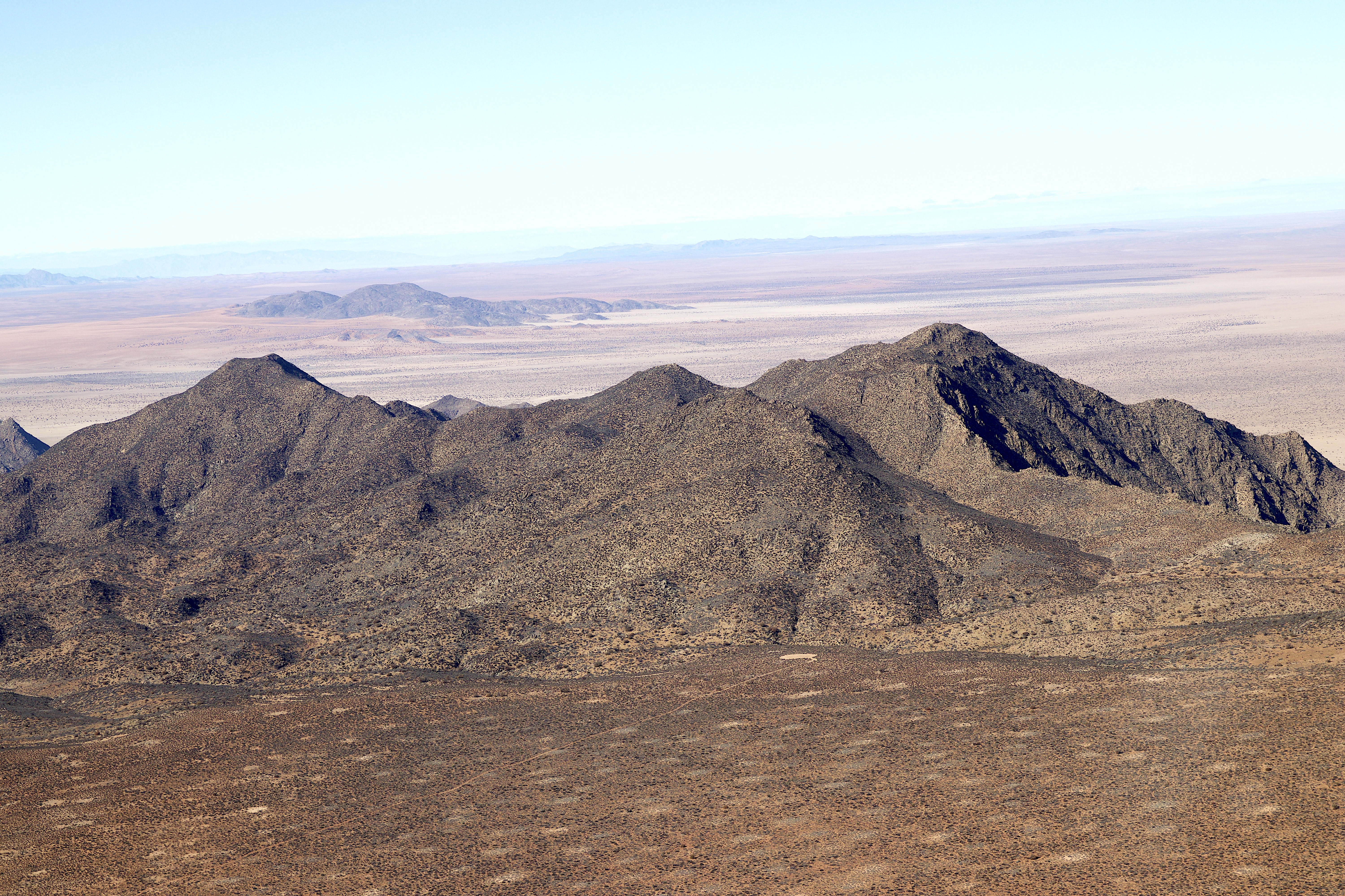 Aurusberg Luftaufnahme 2018